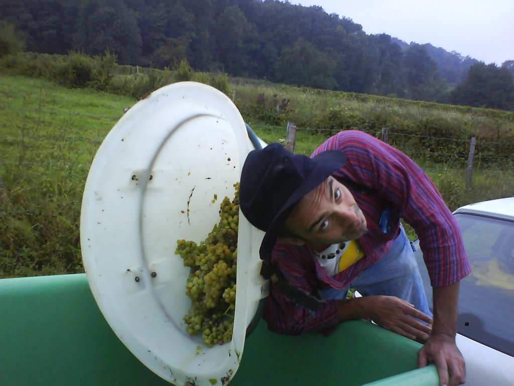 Manu à la bouille pendant les vendanges dans le vignoble du Jura